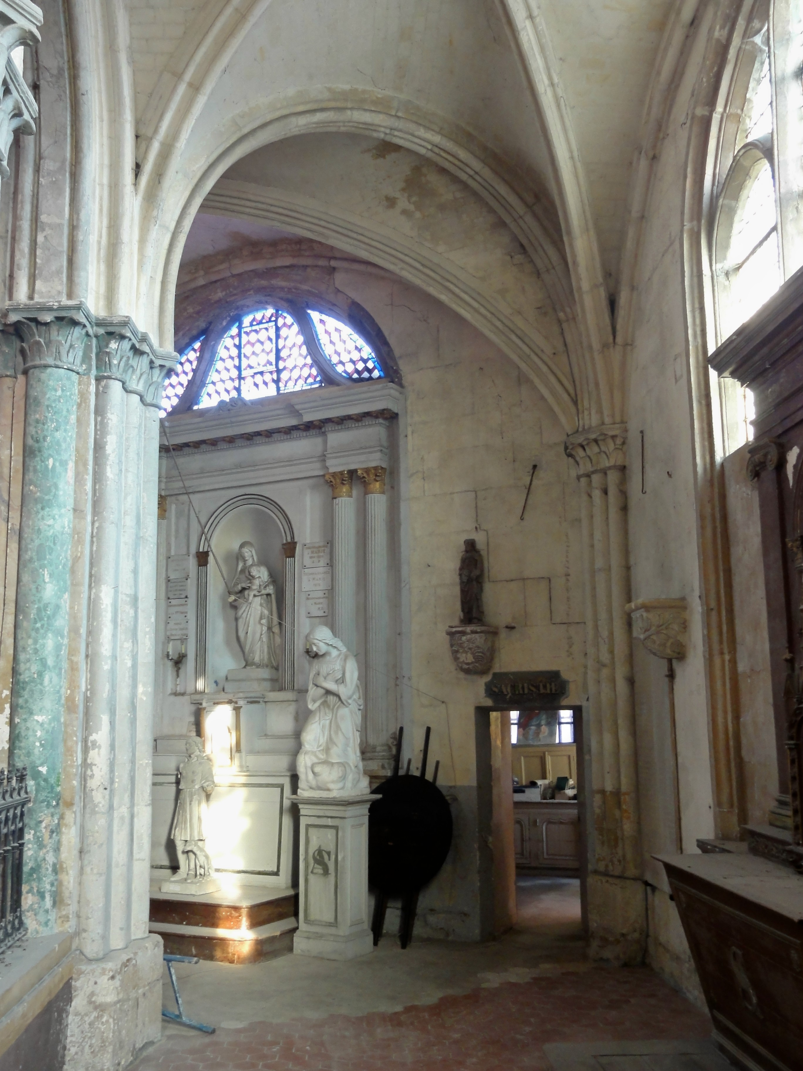 Déambulatoire.